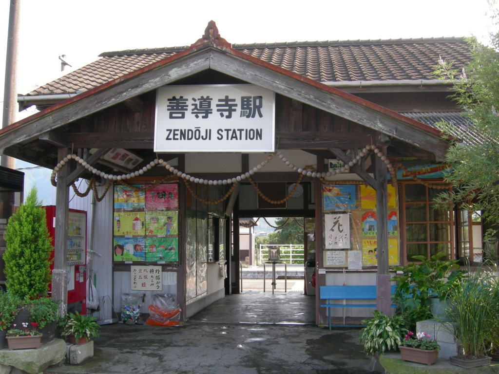 久大本線・善導寺駅